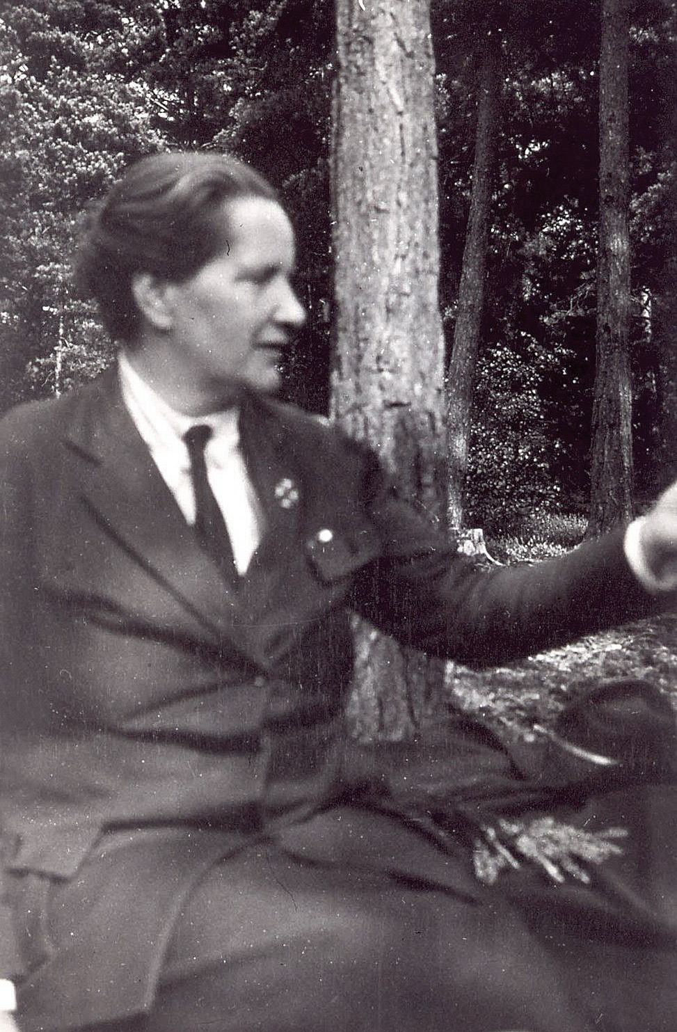 Marie Diemer, Argeronne, sept. 1931. Cheftaine des Guides en 1935. Bibliothèque nationale et universitaire de Strasbourg